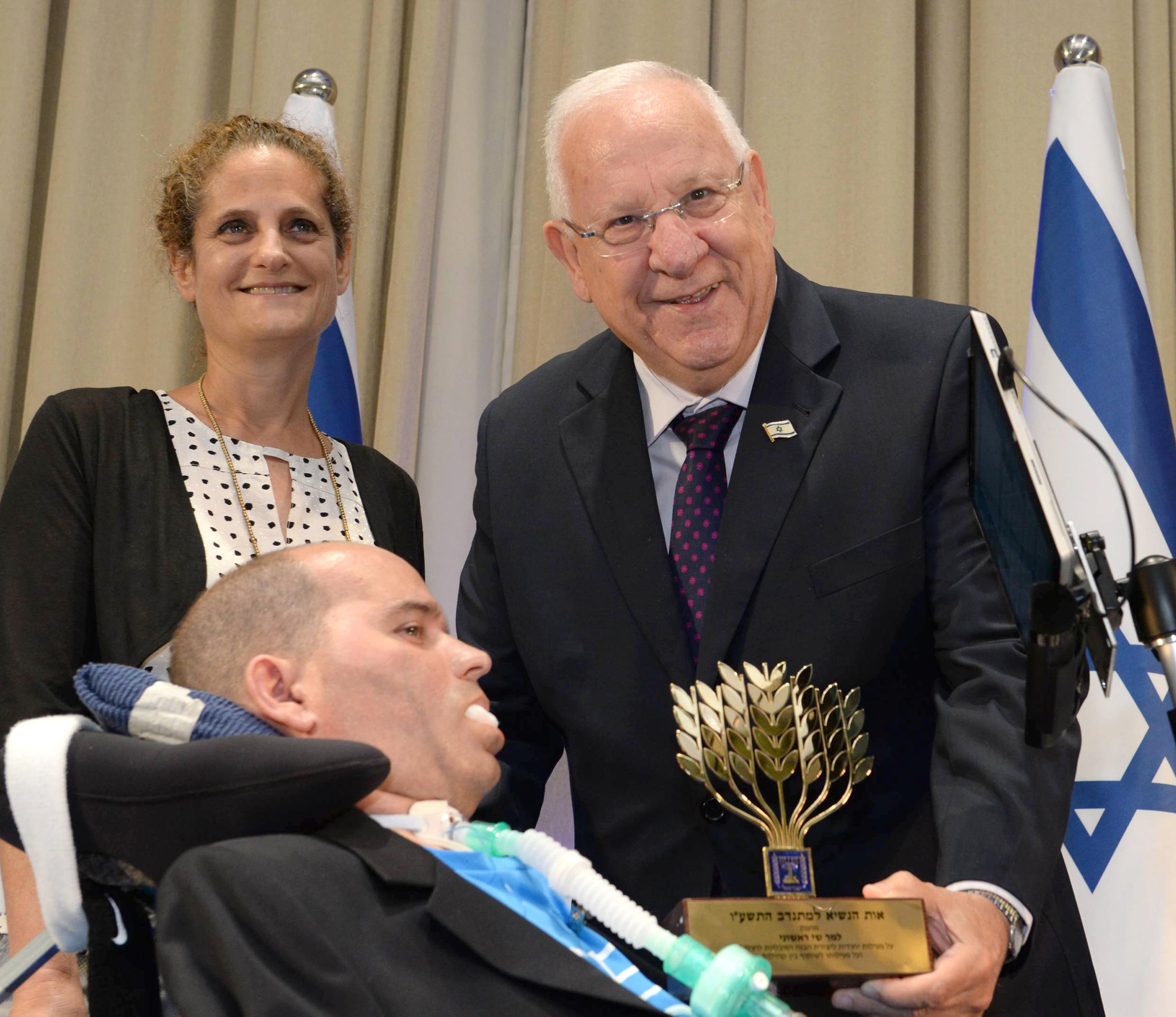 נשיא מדינת ישראל ראובן ריבלין מעניק את אות הנשיא למתנדב לשנת תשע"ו באירוע חגיגי בבית הנשיא לשי ראשוני